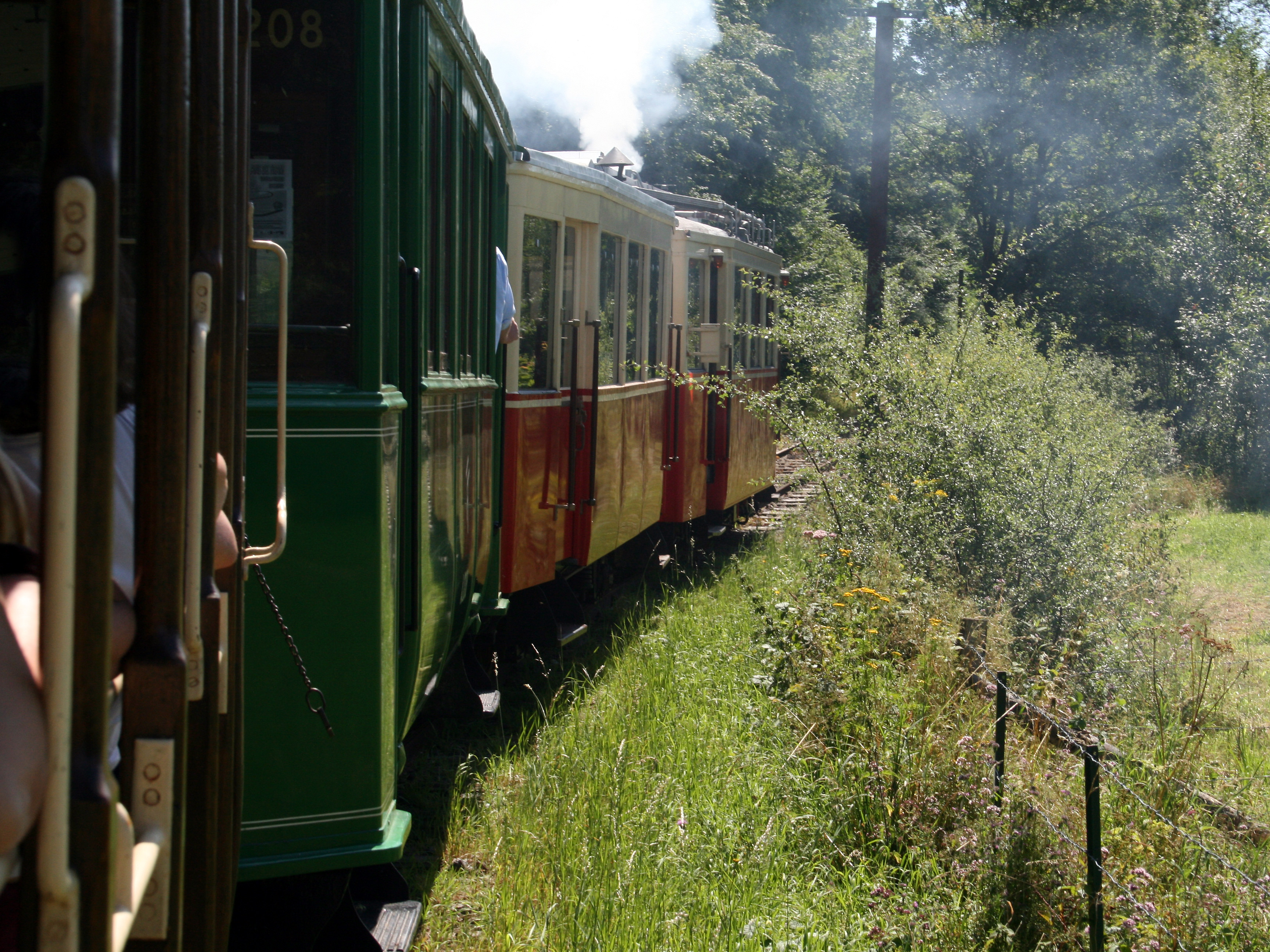 Deux locomotrices diesel du type AR 133 tractant des wagons anciens de la ligne touristique de l'Aisne.